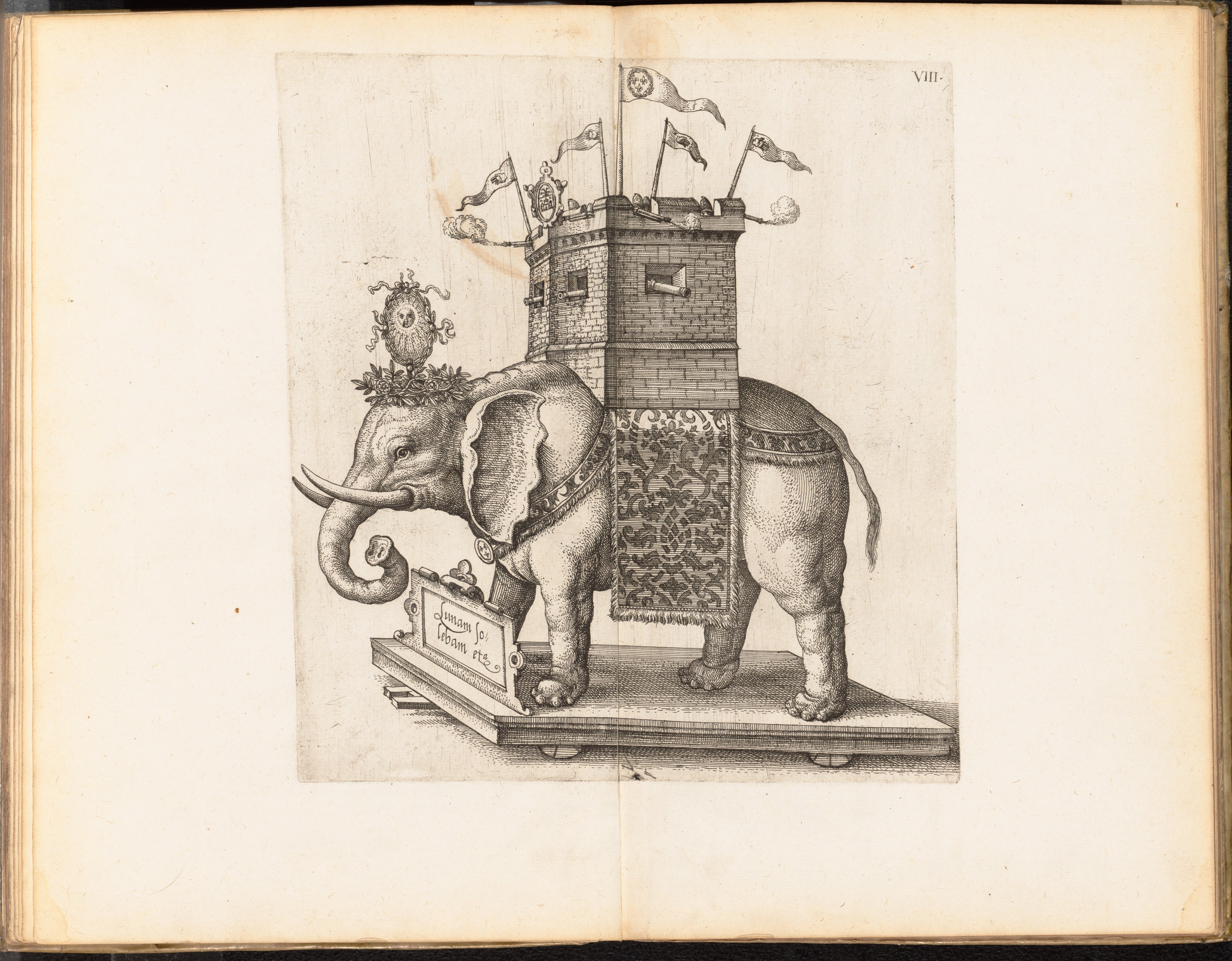 Book; Books